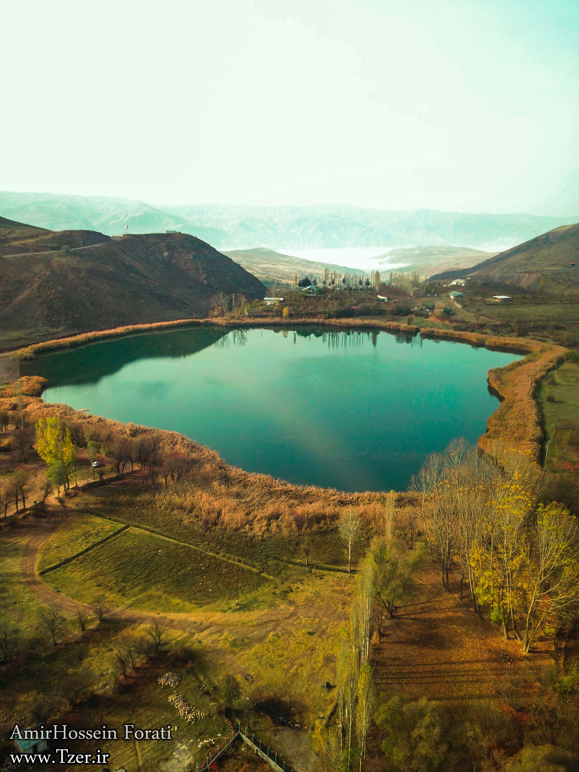 تصویر هوایی از دریاچه اوان عکس از امیرحسین فراتی